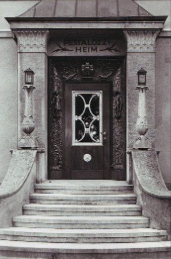 Pestalozzi-Stiftung Hamburg Diestelstraße during earlier times